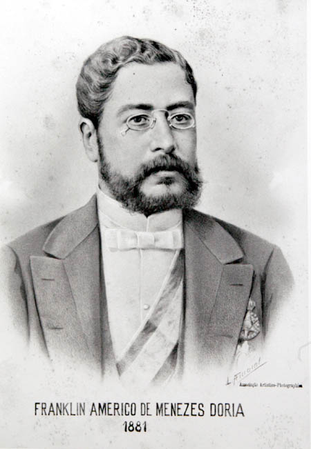 Franklin Américo de Menezes Dória